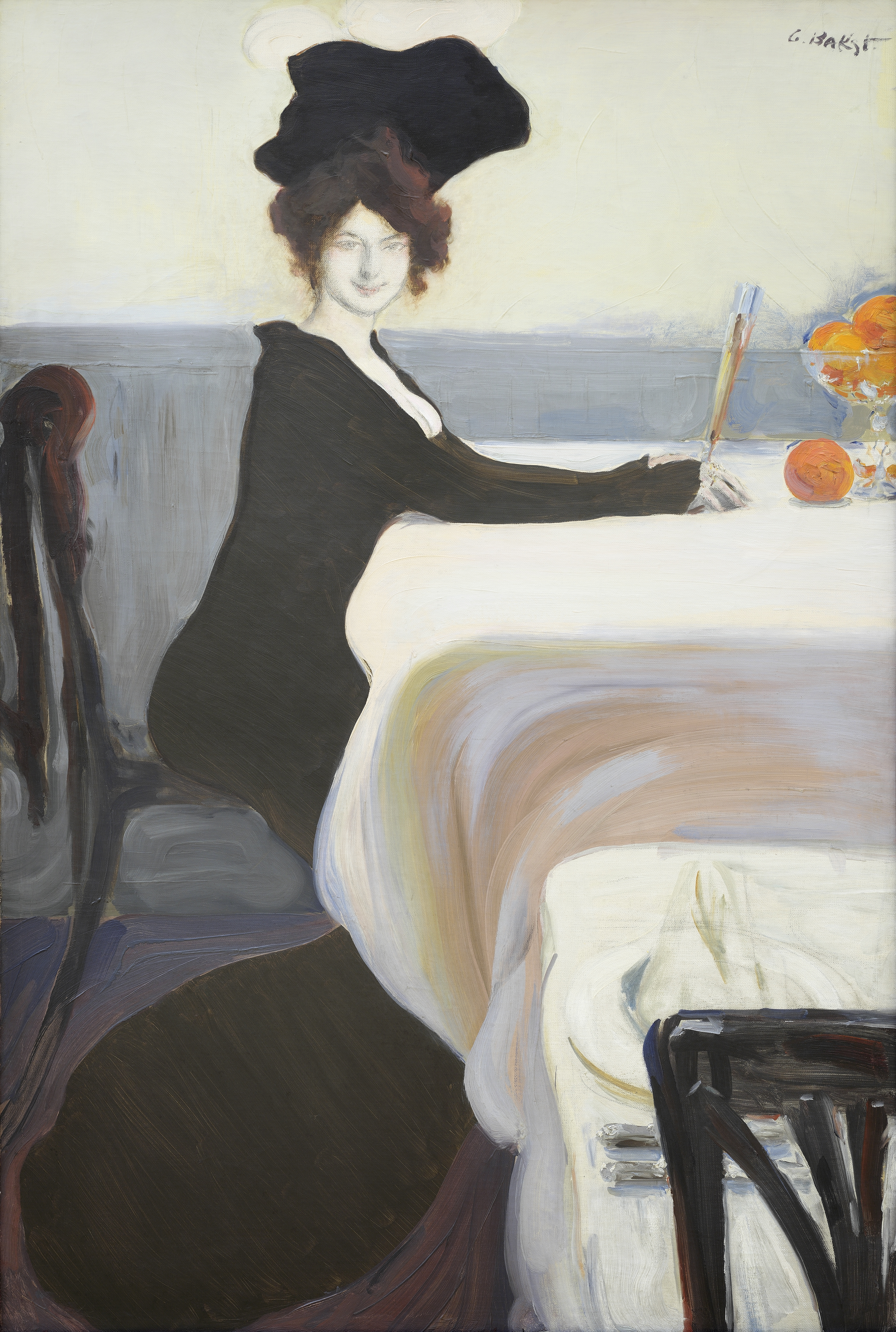 Л. Бакст. "Ужин". 1902